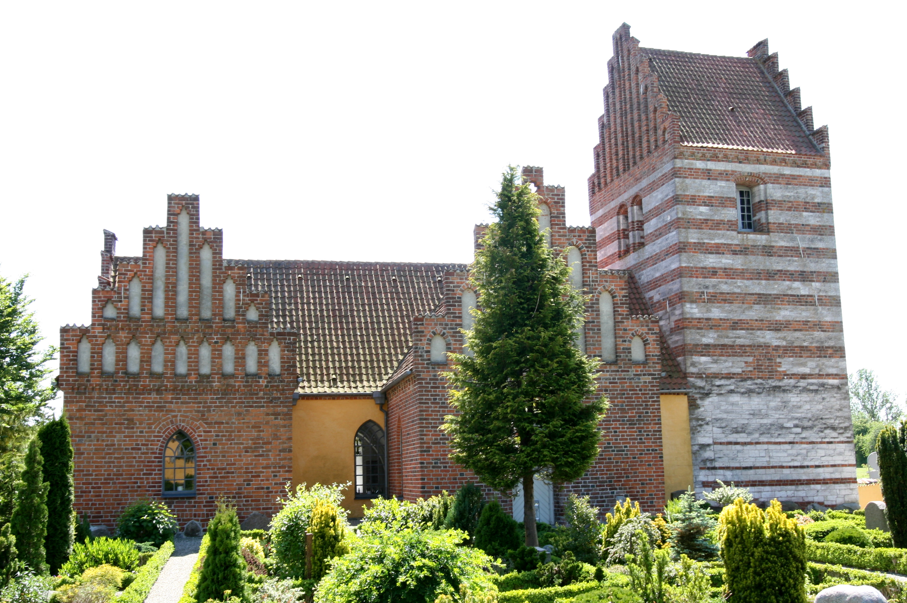 Ølsemagle Kirke, near Køge, Denmark. From north.